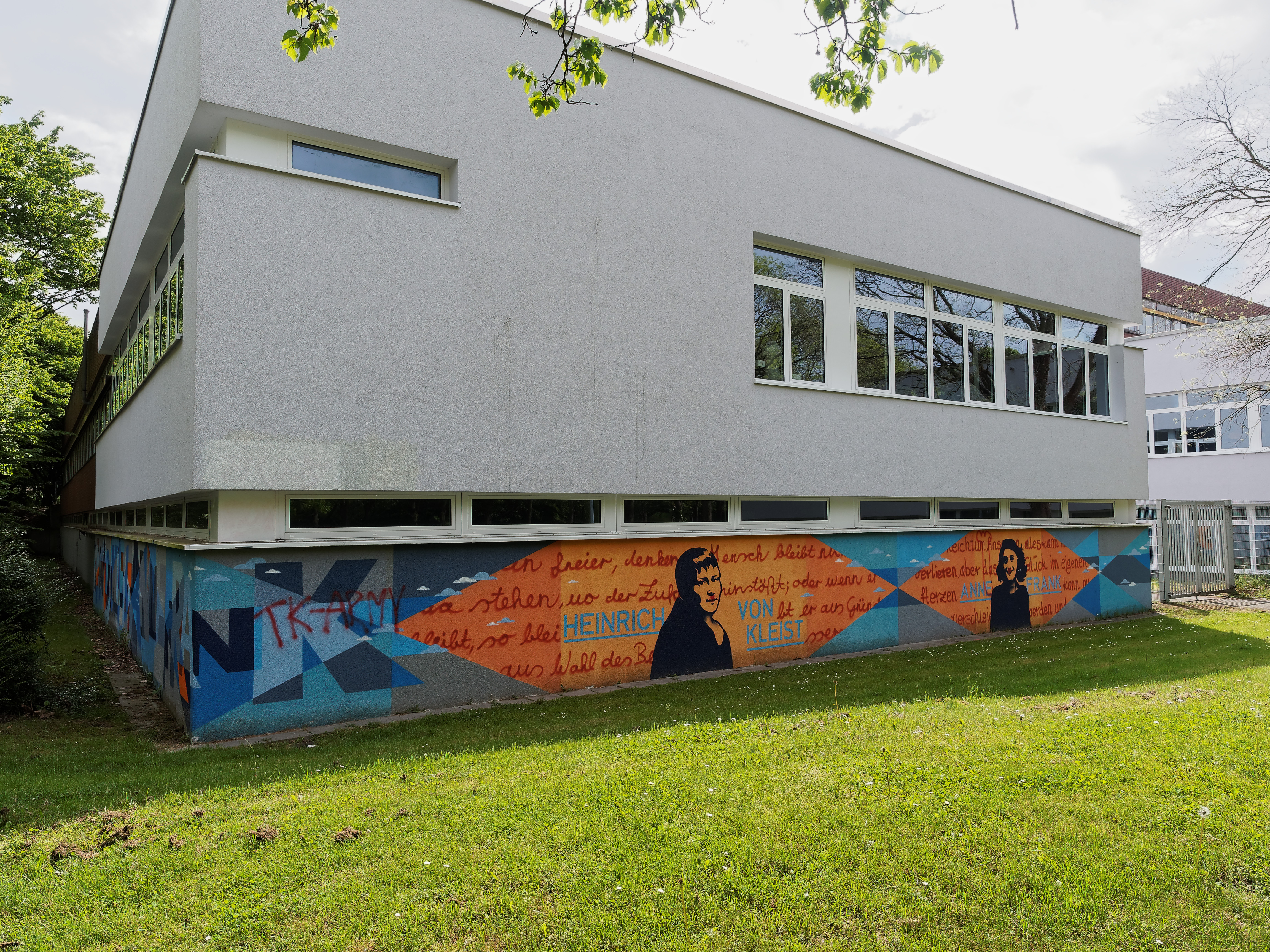 Eingangsbereich des Heinrich-von-Kleist-Gymnasiums und der Anne-Frank-Realschule in Bochum-Gerthe, Castroper Hellweg Ecke Heinrichstraße 2.